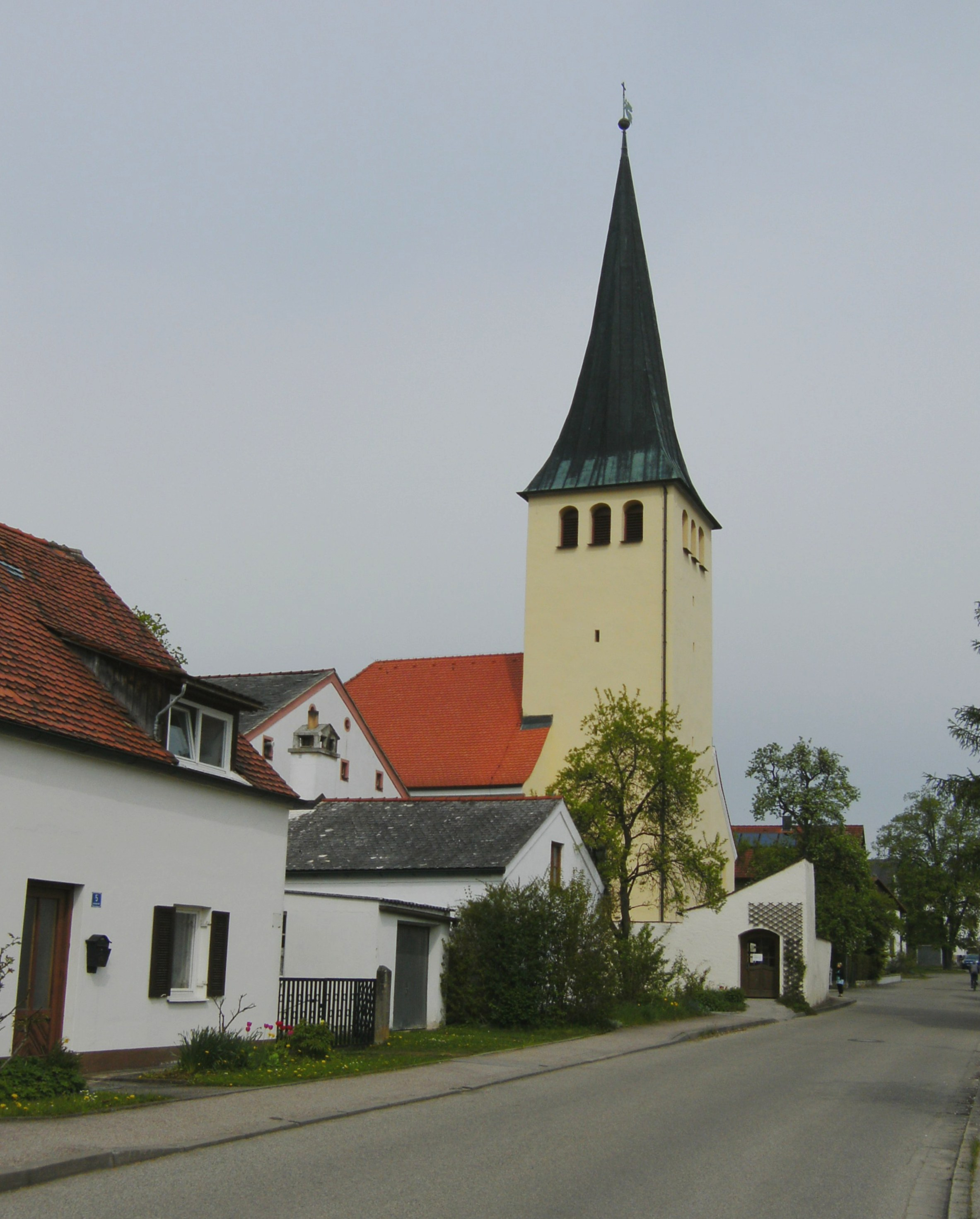 Kirche in Irlahüll, Gemeindeteil von Kipfenberg im Landkreis Eichstätt, Bayern